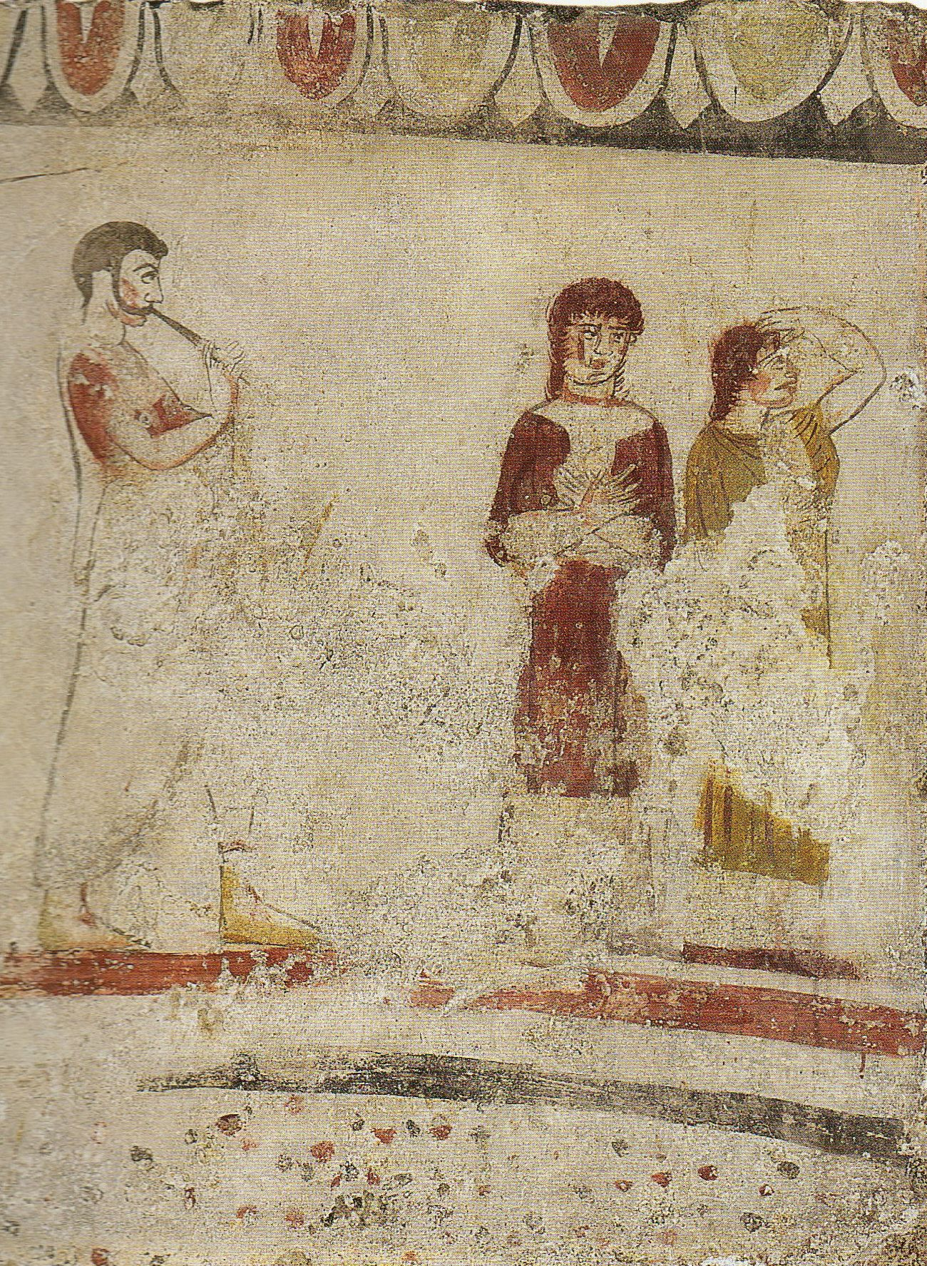 Paestum, Grab des schwarzen Ritters. Detail